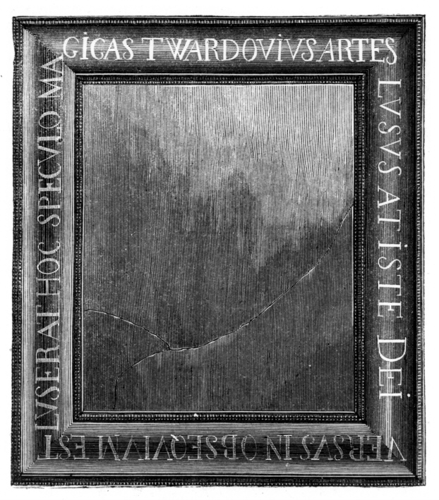 woodcut